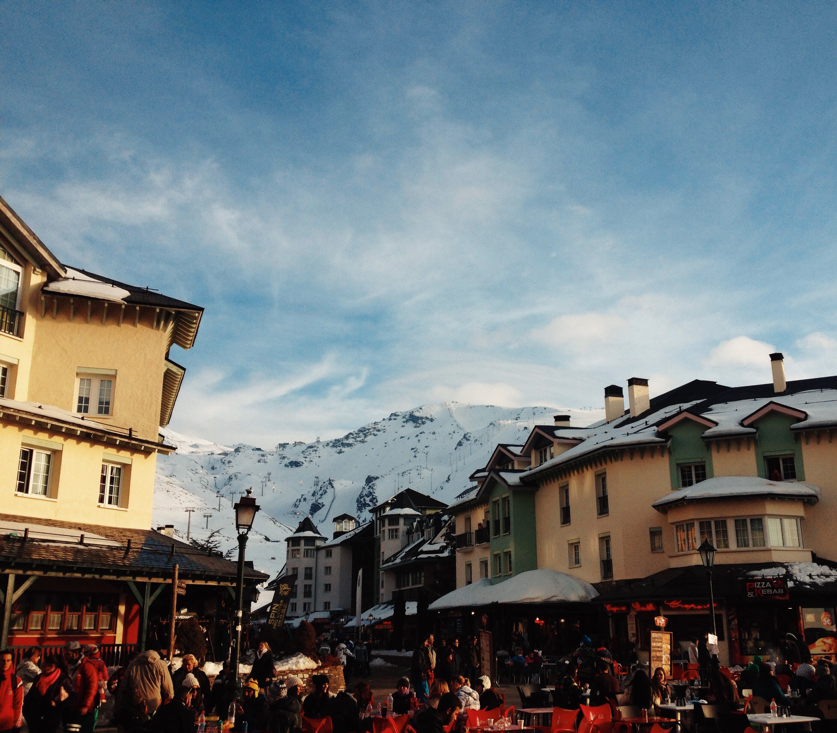 Vista del pequeño pueblo Pradollano y las montañas del Parque Natural de Sierra Nevada.